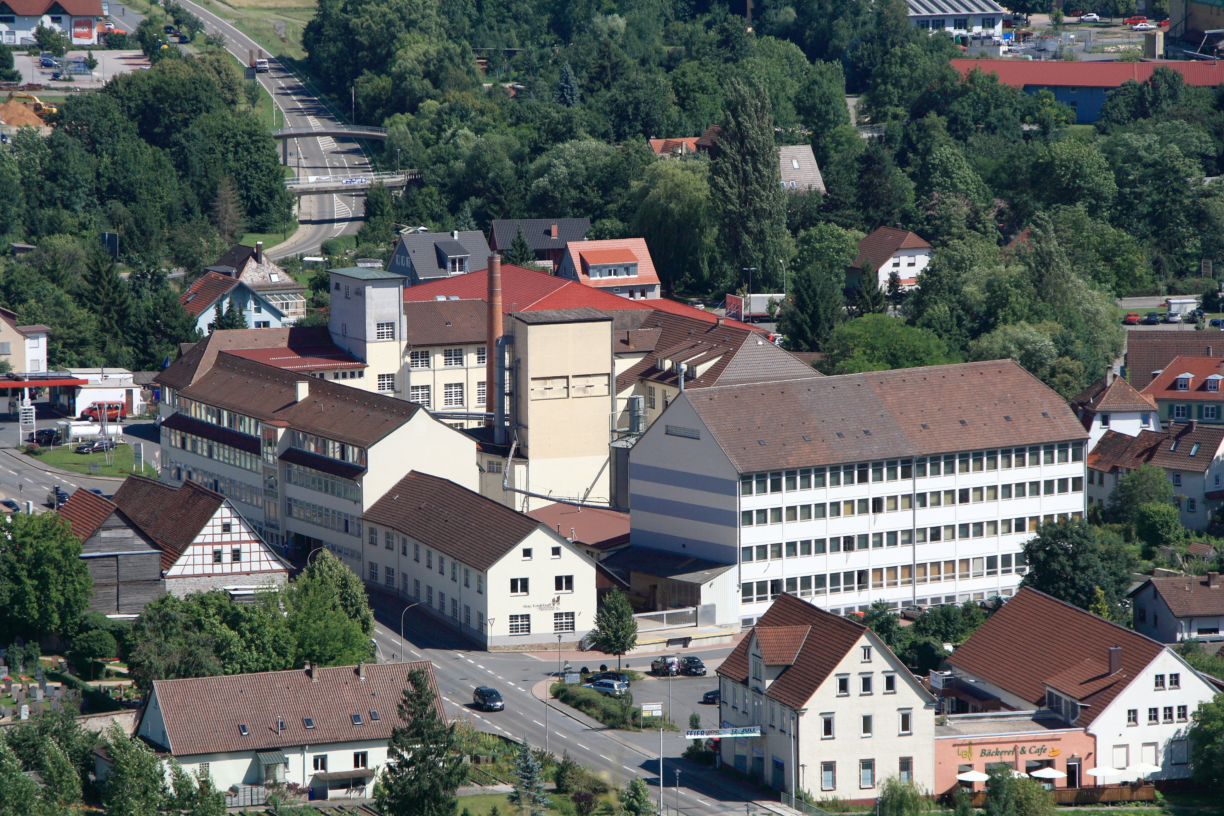 Blick auf die Orgelfabrik Aug. Laukhuff in Weikersheim.